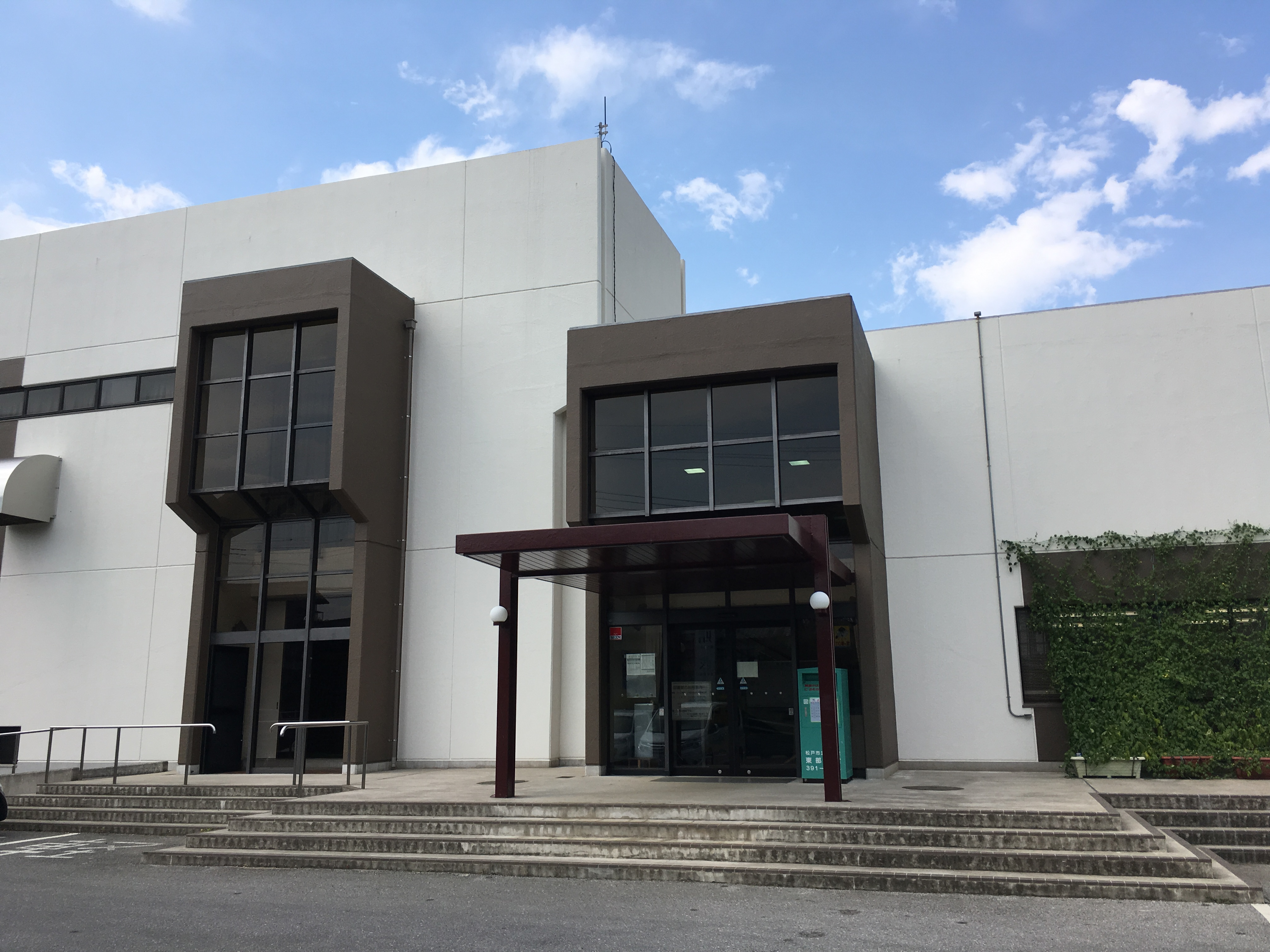 松戸市立図書館東部分館